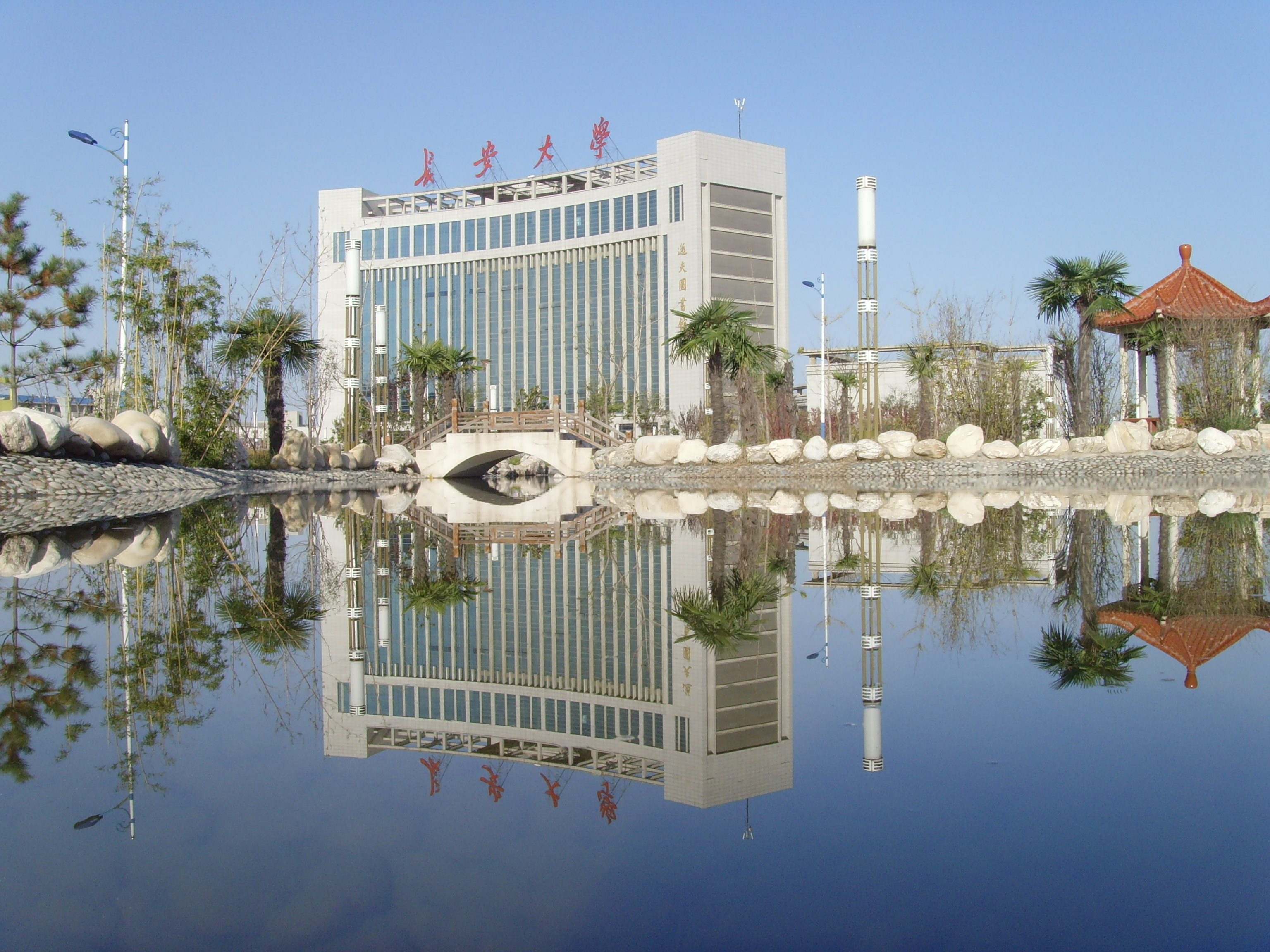 拍摄于行政楼东侧湖边